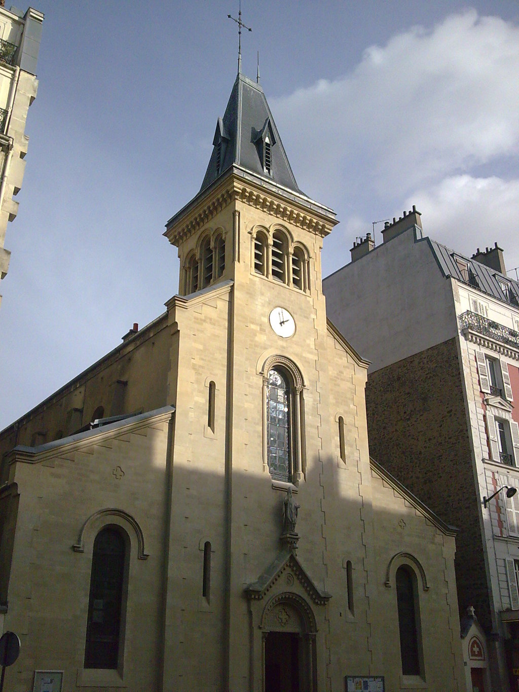 Façade de l'Eglise nouvelle Saint François de Sales à Paris